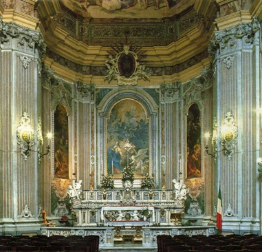 Chiesa della Nunziatella, interno (Napoli)